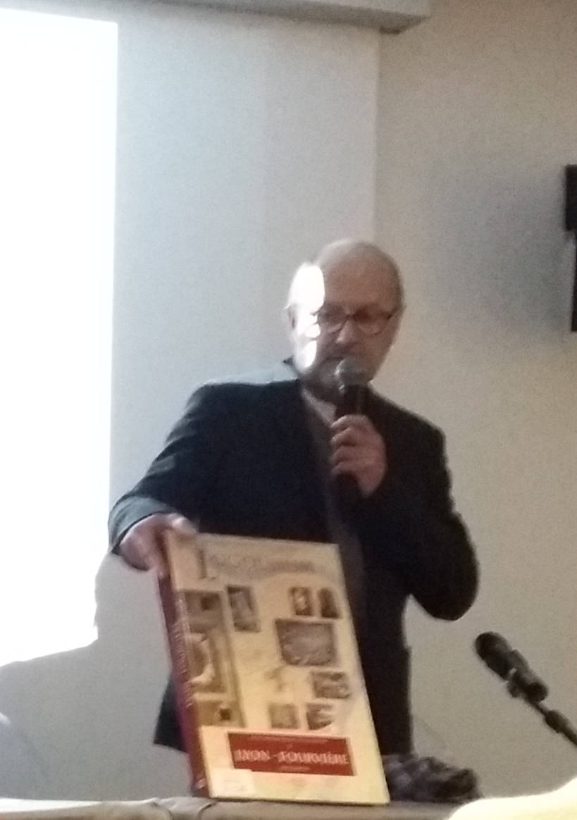 Michel Lenoble présentant le premier volume de l'Atlas topographique de Lugdunum, lors d'une conférence aux Archives municipales de Lyon. Personality rights warningAlthough this work is freely licensed or in the public domain, the person(s) shown may have rights that legally restrict certain re-uses unless those depicted consent to such uses. In these cases, a model release or other evidence of consent could protect you from infringement claims.